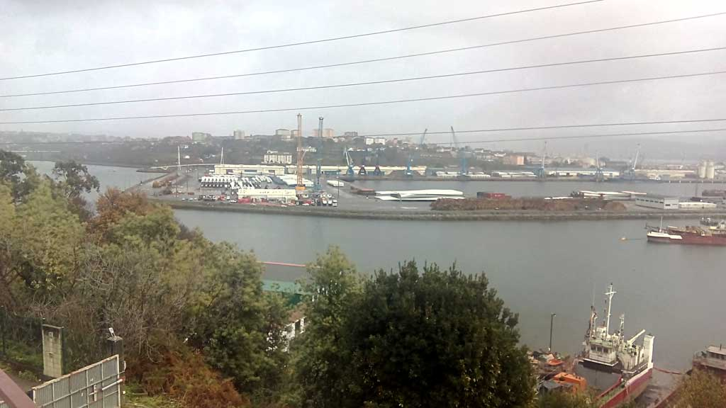 Pezas eólicas de Gamesa no porto de Ferrol.